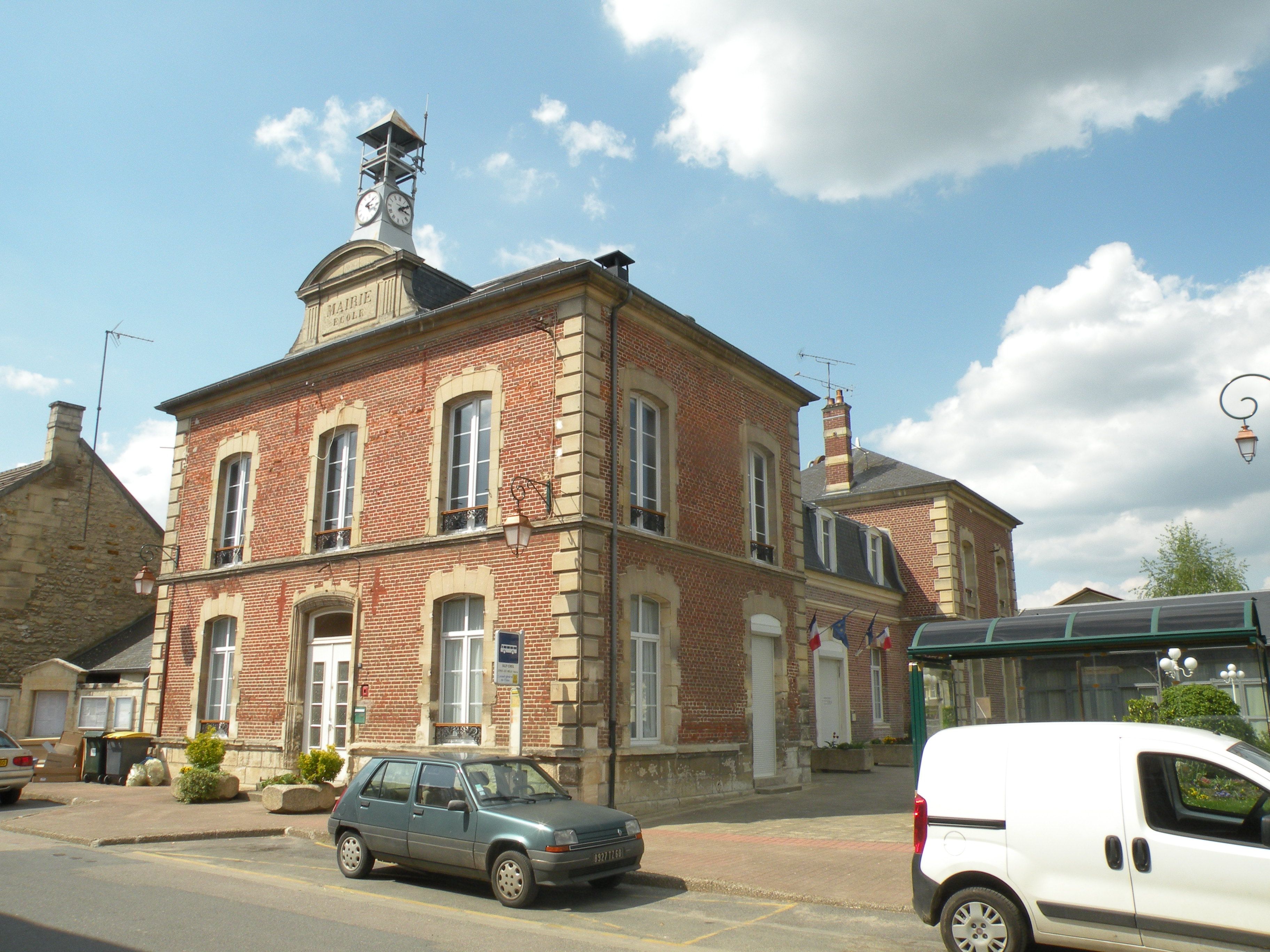 mairie de Cires-lès-Mello, oise, france